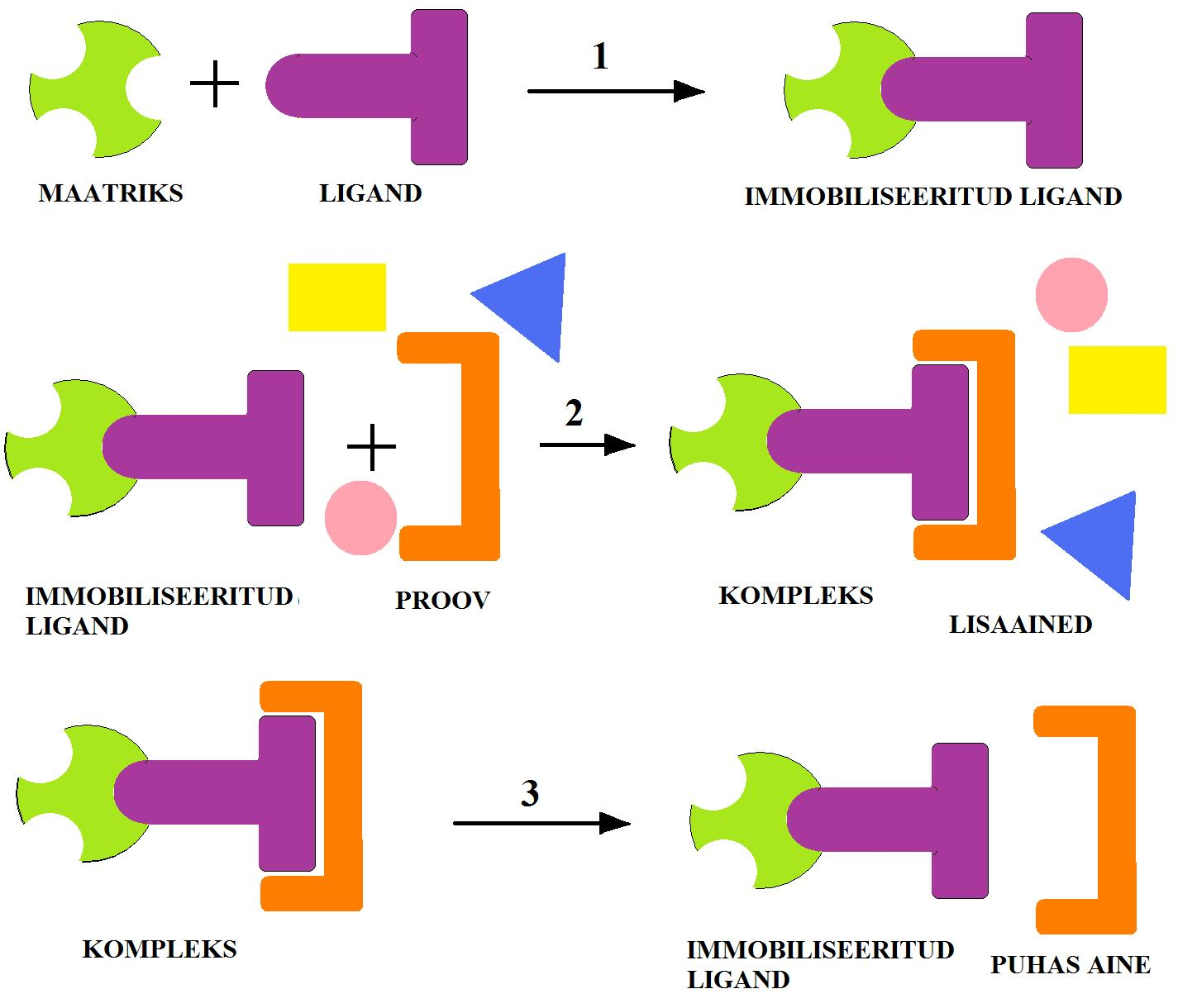 Esmalt kinnitub ligand maatriksi külge, seejärel seondub uuritav aine ning eemaldatakse lisaained. Kompleks lõhutakse ära ja saadakse kätte puhas aine.